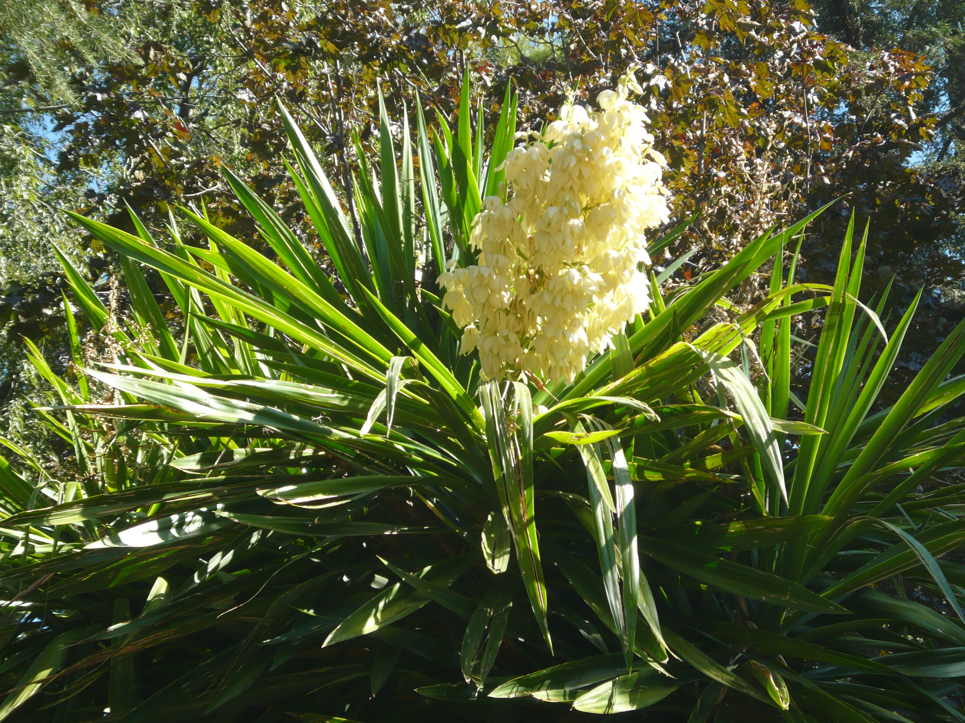 Yucca elephantipes. Real Jardín Botánico de Madrid